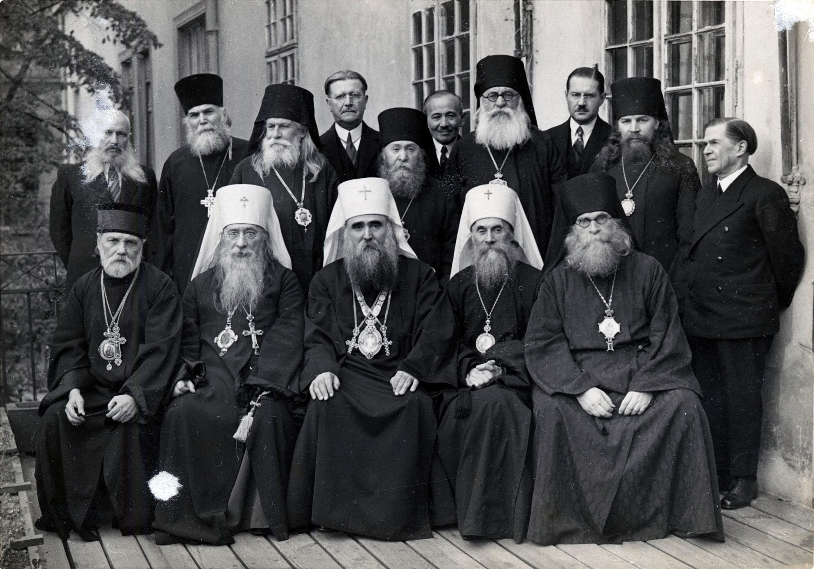 Совещание заграничных русских архиереев под председательством сербского патриарха Варнавы в Сремских Карловцах, на котором было выработано "Временное положение о Русской Православной Церкви заграницей." Октябрь 1935 г. В нижнем ряду слева направо сидят: митрополит Феофил (Пашковский) (Северо-Американская митрополия, США) митрополит Евлогий (Георгиевский) (Западноевропейский Экзархат Константинпольского Патриархата, Франция) Патриарх Сербский Варнава (Сербская православная церковь, Югославия) митрополит Анастасий (Грибановский) (РПЦЗ, Югославия) епископ Димитрий (Вознесенский) (РПЦЗ, Китай) Стоят слева направо: ??? протопресвитер Петр Беловидов (РПЦЗ, Югославия) архиепископ Гермоген (Максимов) (РПЦЗ, Югославия) ??? архиепископ Серафим (Лукьянов) (РПЦЗ, Франция) ??? возможно, С.В. Троицкий архиепископ Феофан (Гаврилов) (РПЦЗ, Югославия) ??? возможно, Т.А. Аметистов епископ Иоанн (Булин) (ЭАПЦ, Эстония) ??? возможно, В.А. Маевский